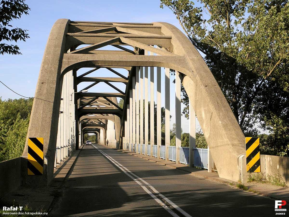 Most na Pilicy - widok od strony Białobrzegów.